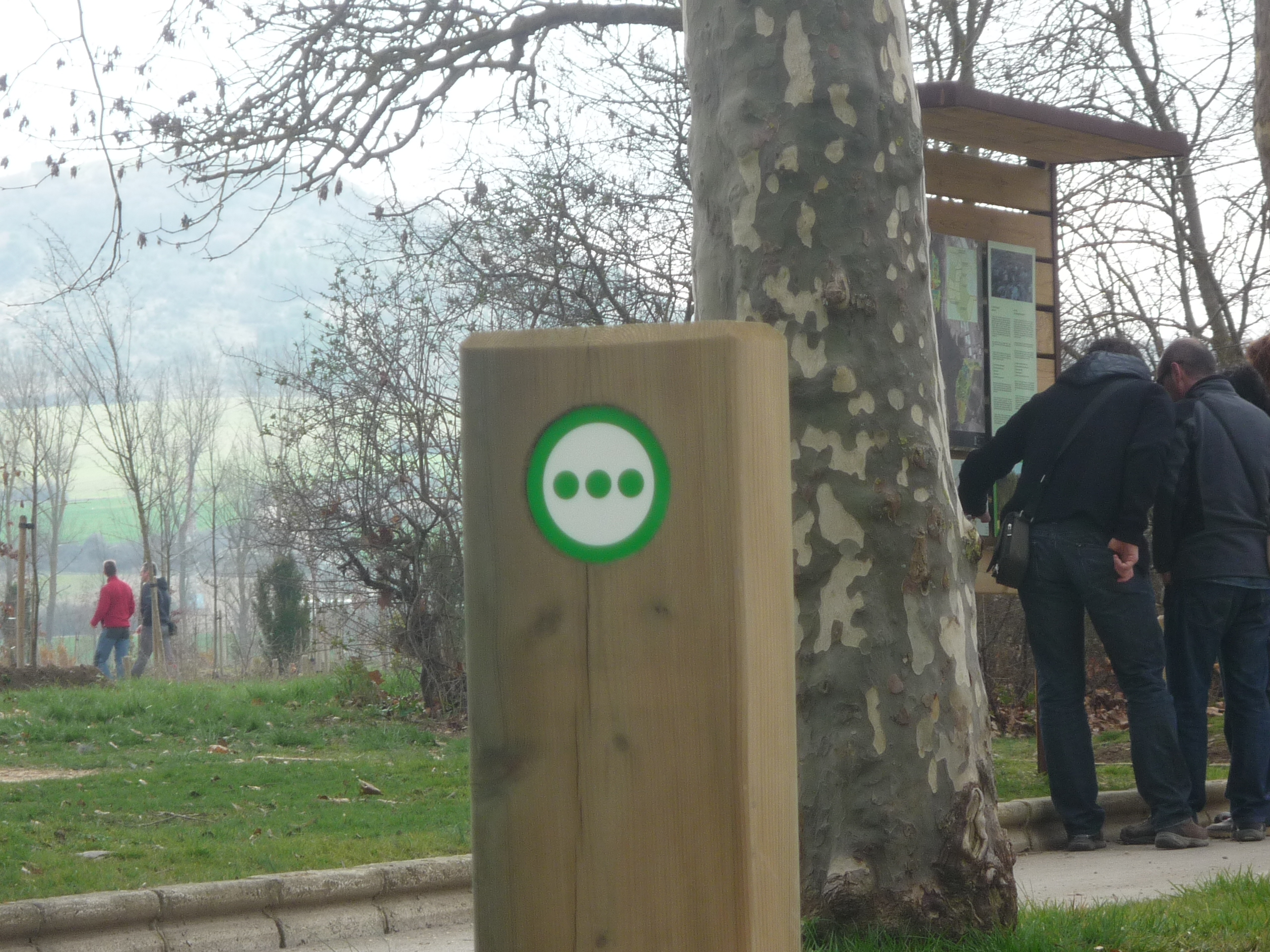 Eraztun berdearen ikurra eta atzean Olarizu mendia